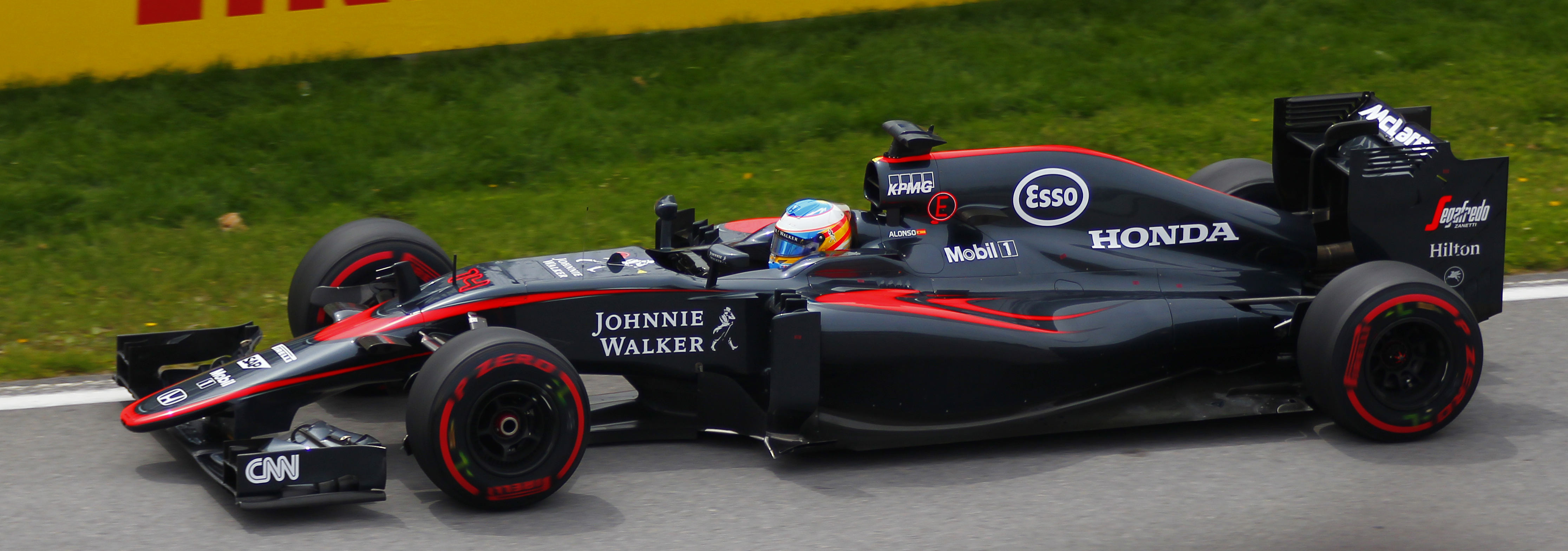 Fernando Alonso - McLaren Racing - Grand Prix du Canada - Circuit Gilles-Villeneuve - 7 juin 2015 (Photo Paul-Émile Poulin-Jacques)